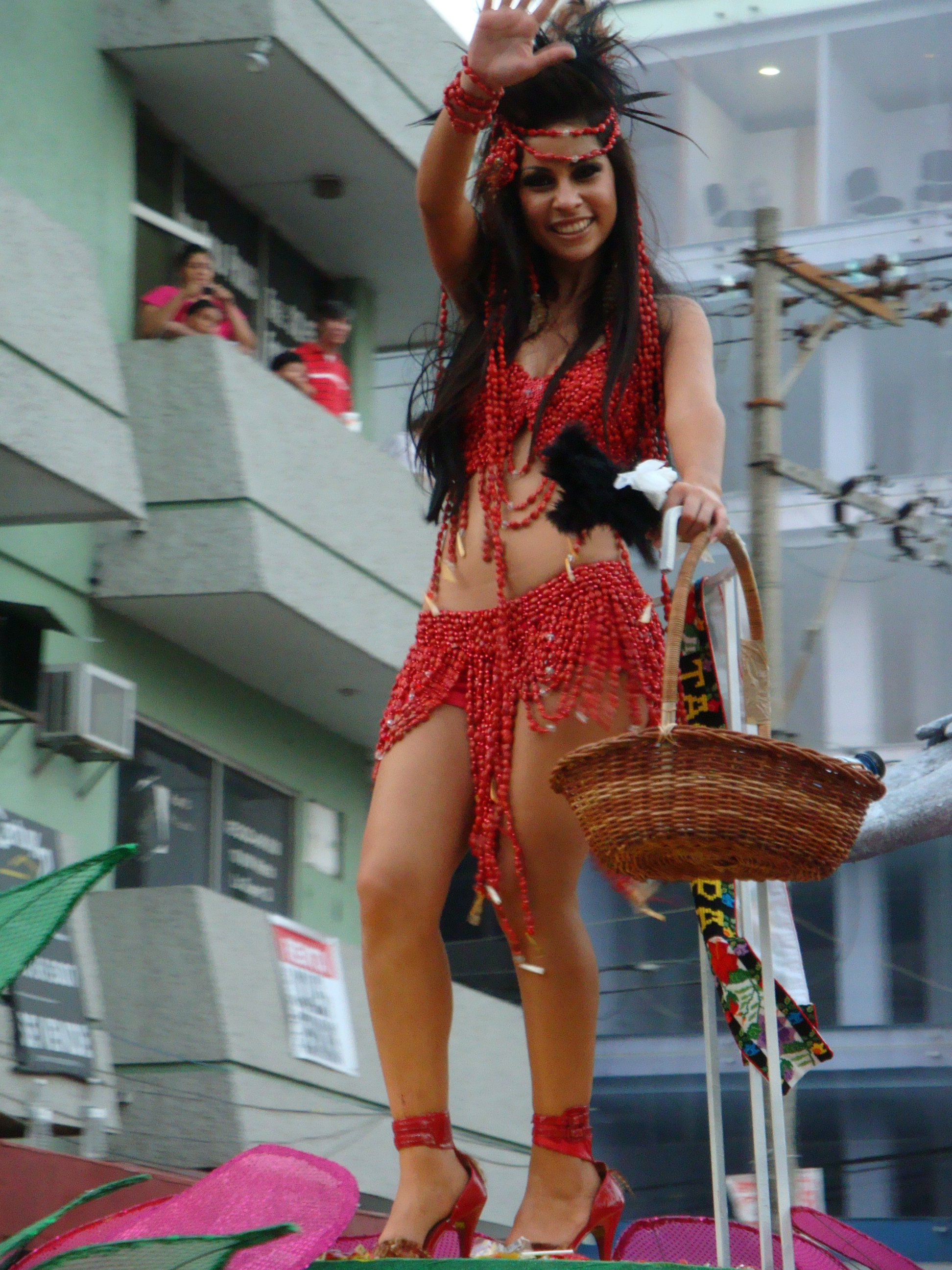 Pamela Gil Embajadora del municipio de Tacotalpa. durante el desfile de carros alegóricos, en la Feria Tabasco. Villahermosa, Tabasco.